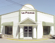 Oficinas de la prensa de sabianas